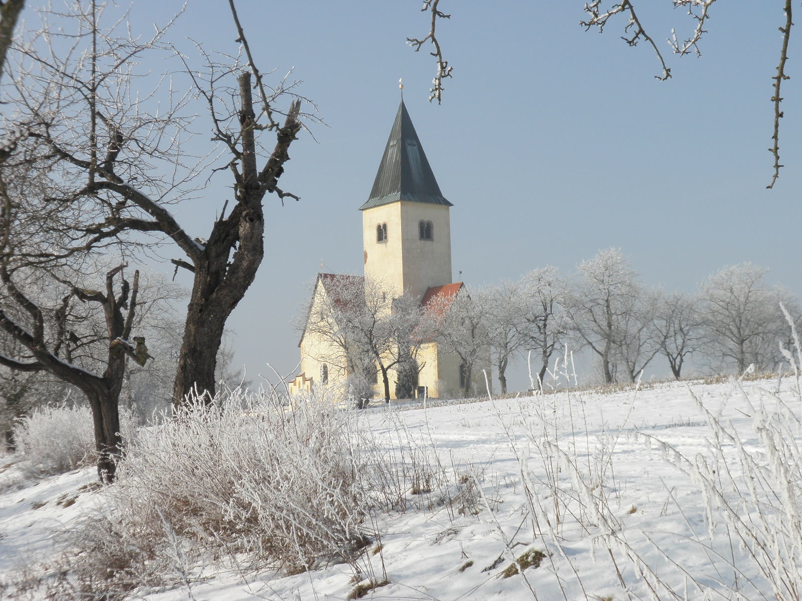 Benešov-Chvojen, okres Benešov. Kostel svatého Jakuba Staršího v zimě.